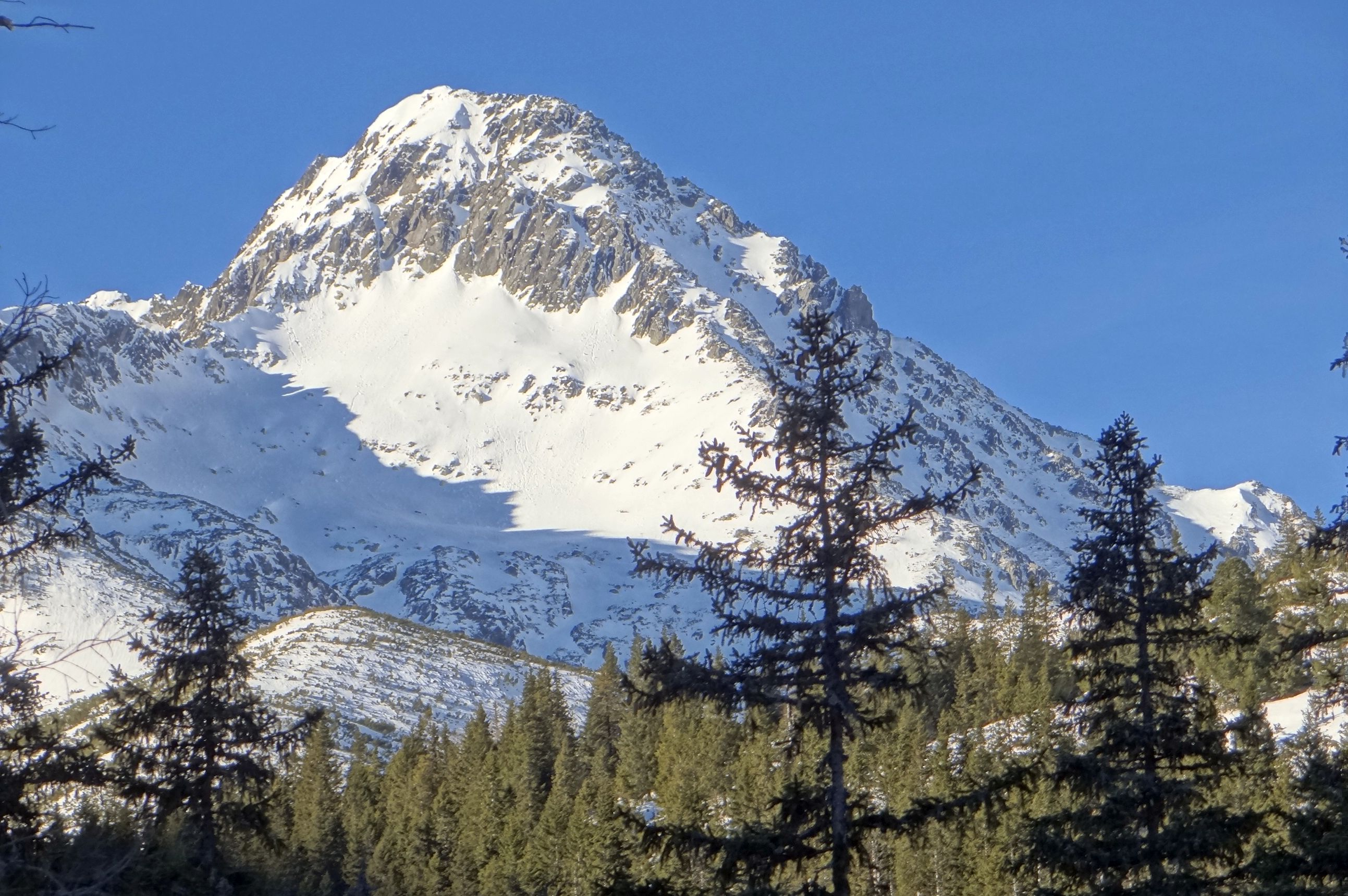 Jahňací štít